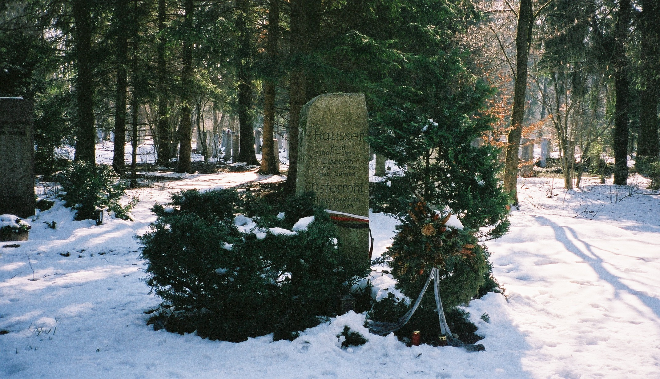 Grave of Generaloberst der Waffen-SS Paul "Papa" Hausser